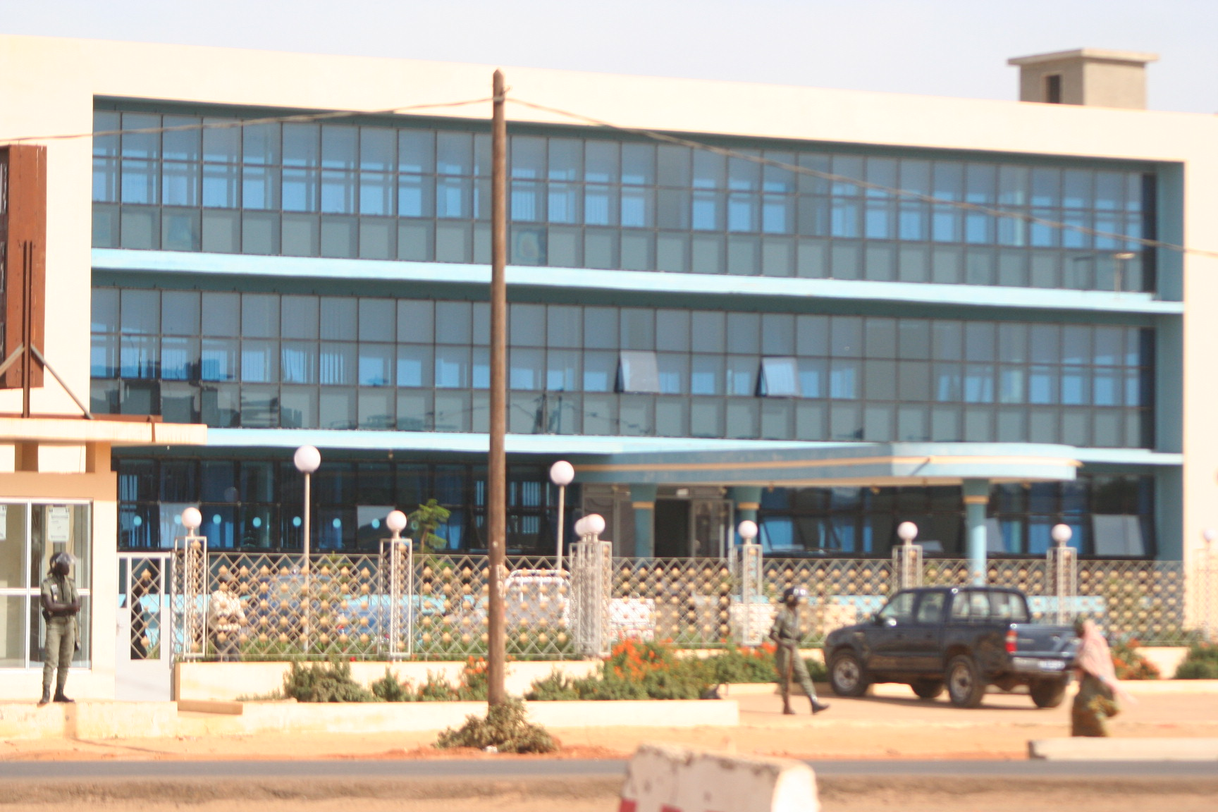 Permanence Oumar Lamine Badji à Dakar (permanence du PDS, Parti démocratique sénégalais )